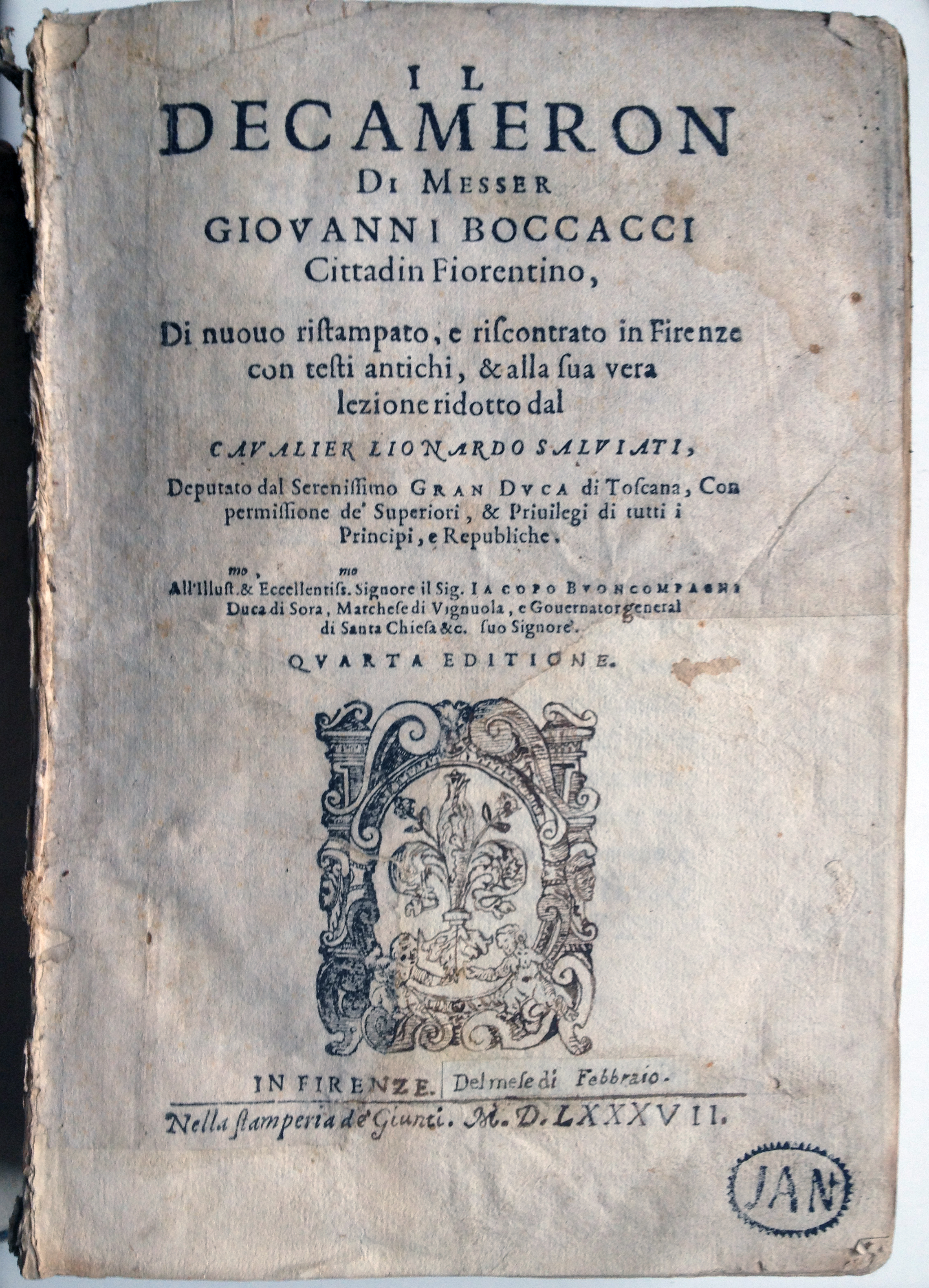 Il Decamerone